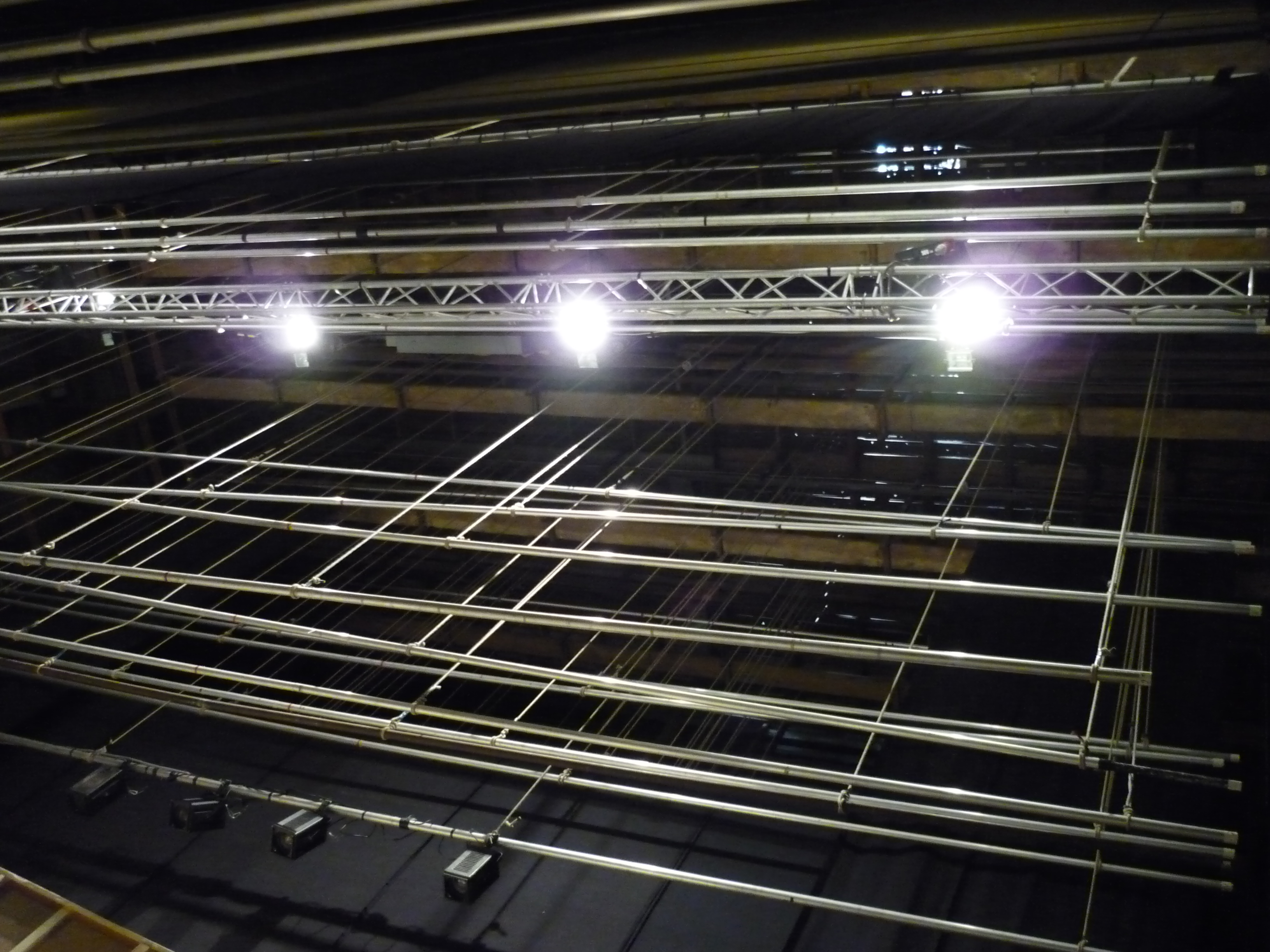 Cintres du Théâtre royal des Galeries vu depuis la scène.